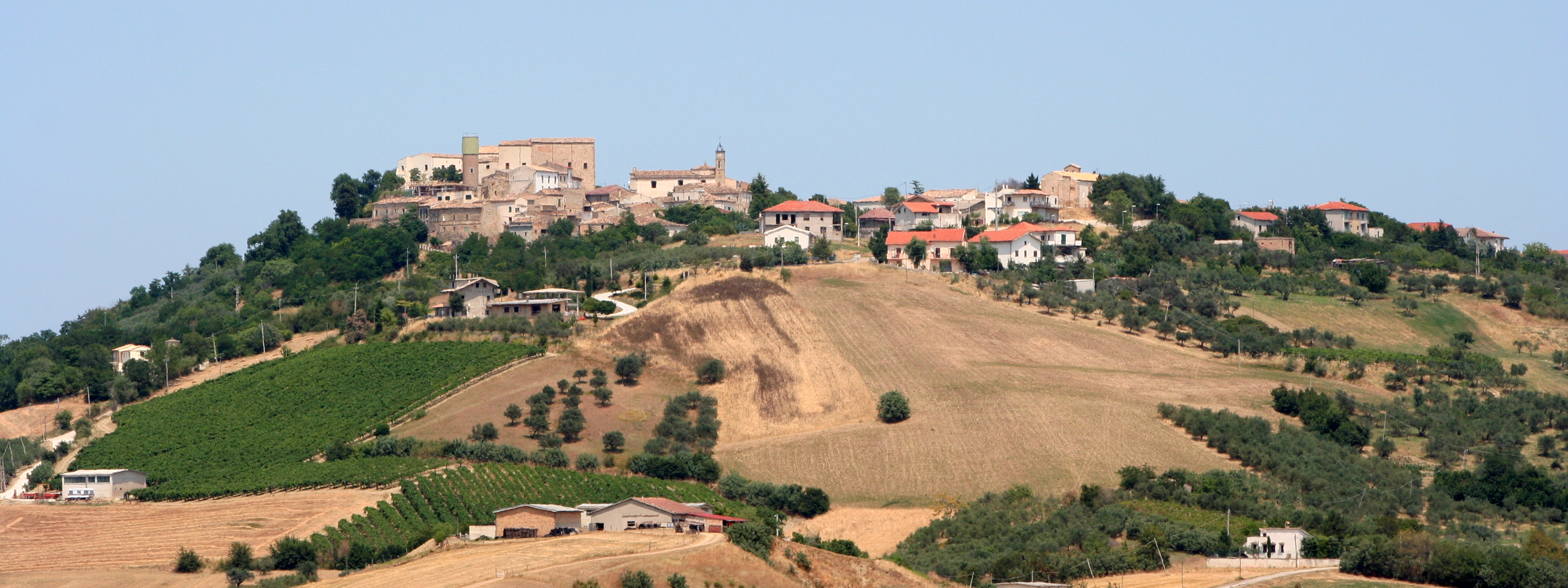 Nocciano Veduta del paese, Italy